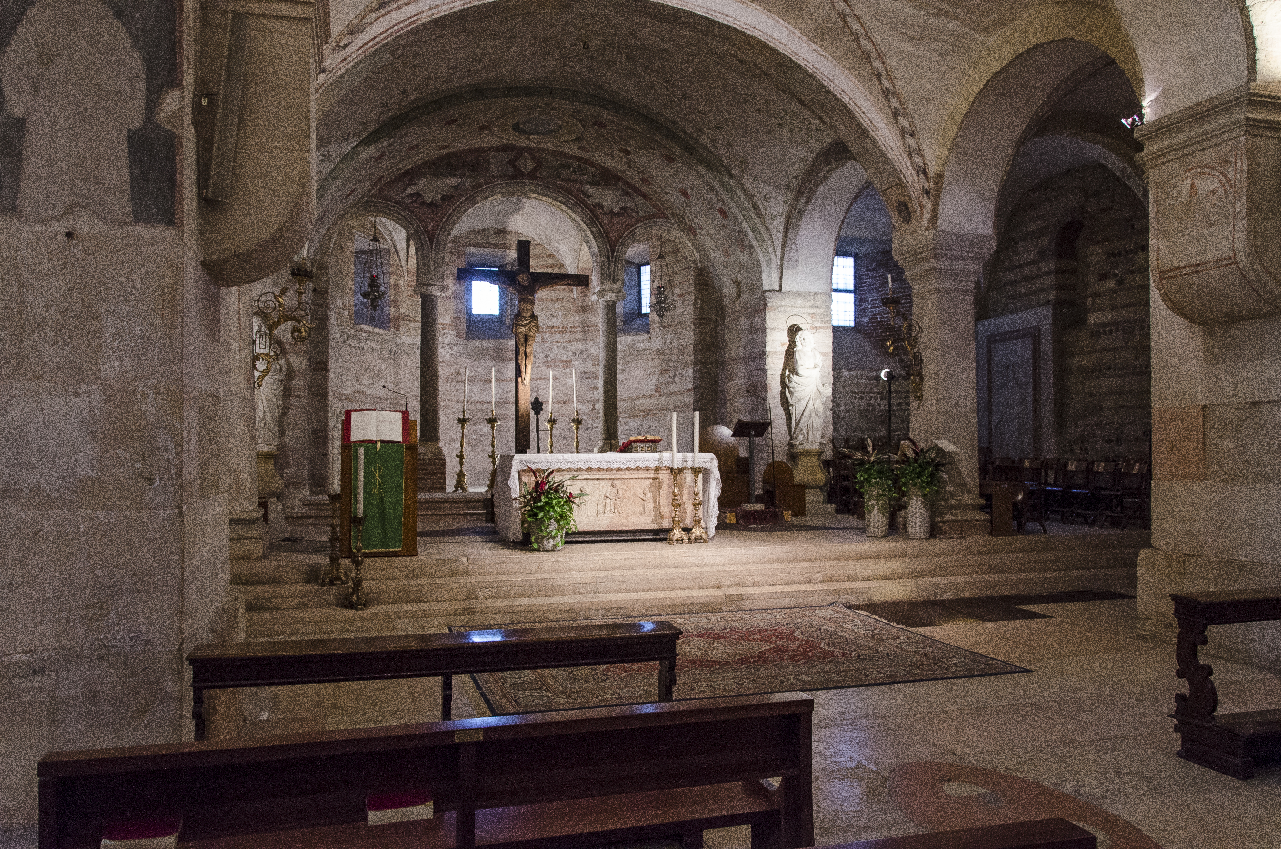 Fotografia della chiesa inferiore